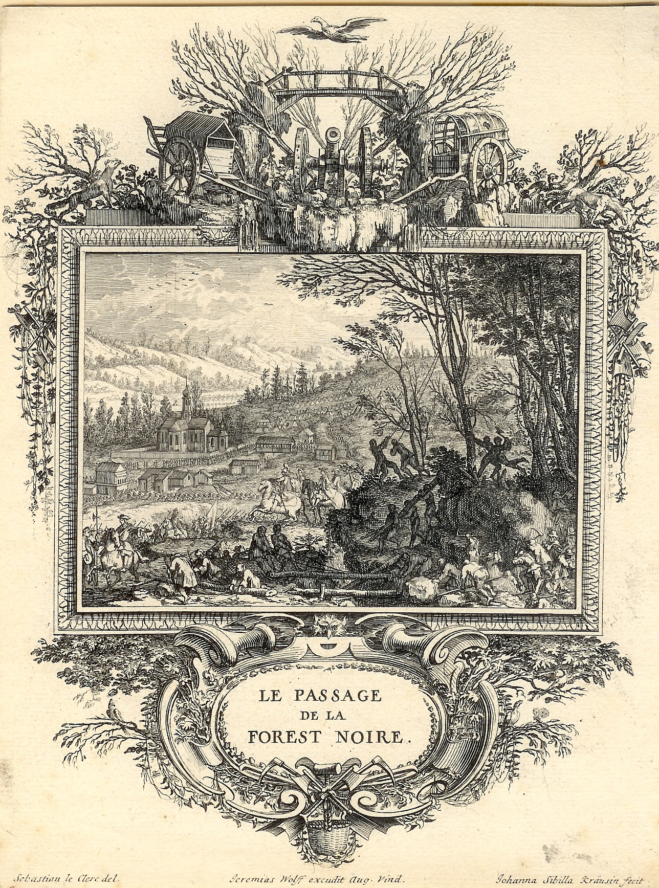 Pioniere unter Karl Charles IV, Duke of LorraineV. von Lothringen vor Todtmoos